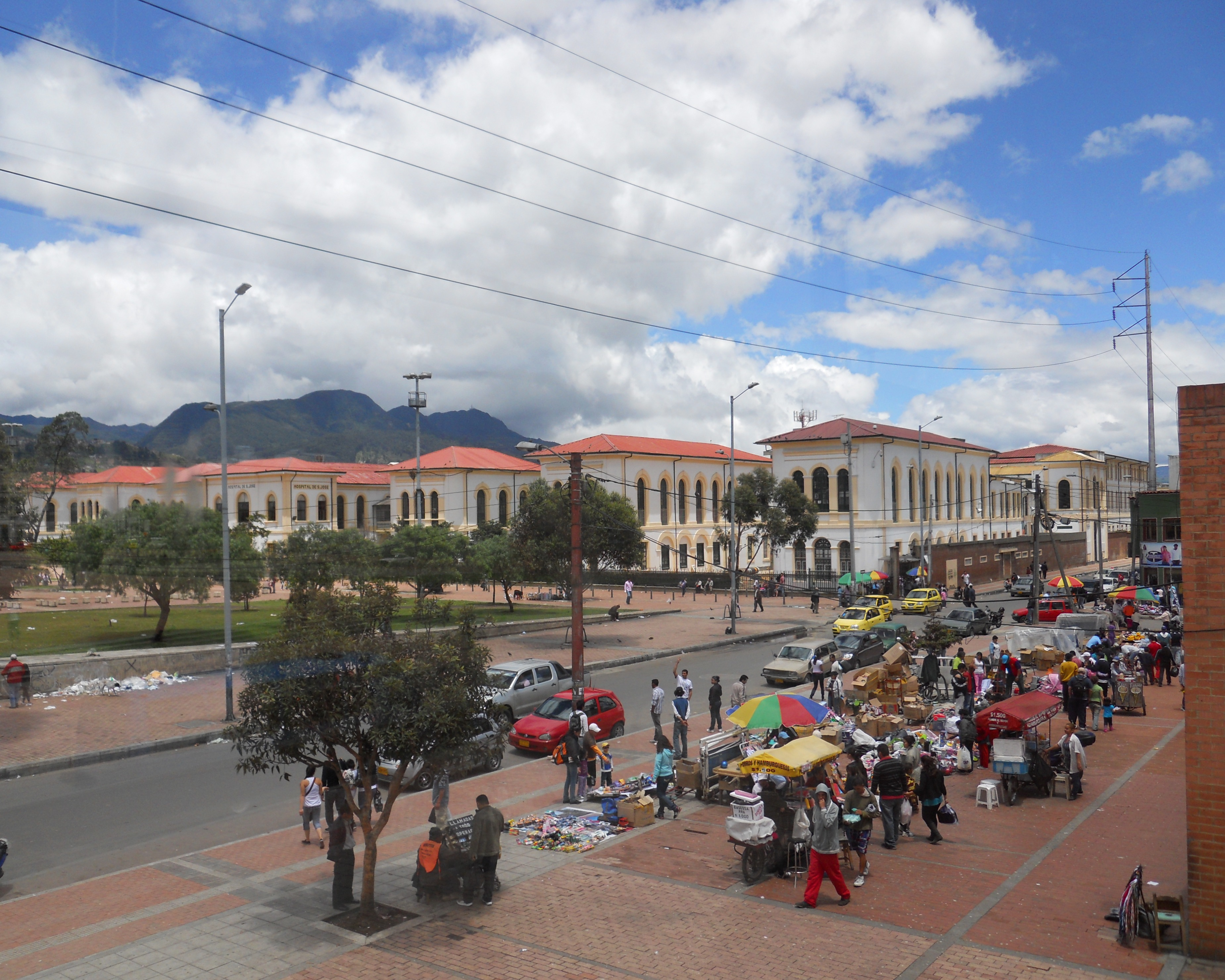 Hospital de San José, en la Plaza España de Bogotá. Barrio Voto Nacional de la localidad de Los Mártires.